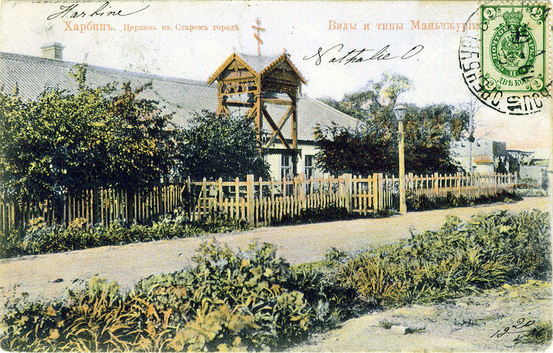 Первый православный храм в Старом Харбине 1898